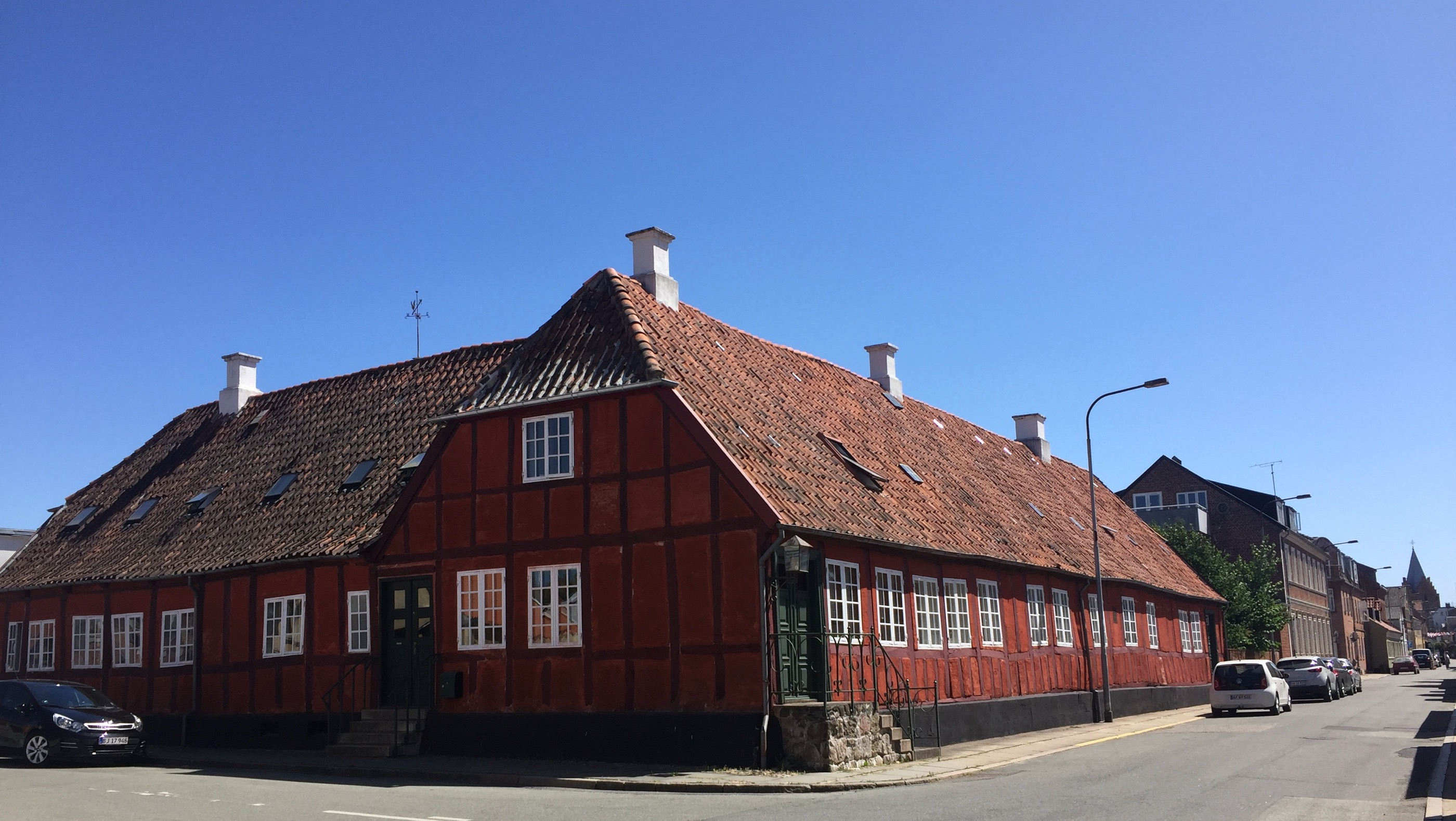 Nobelpris-vinderen August Kroghs fødehjem. Huset er i dag fredet.